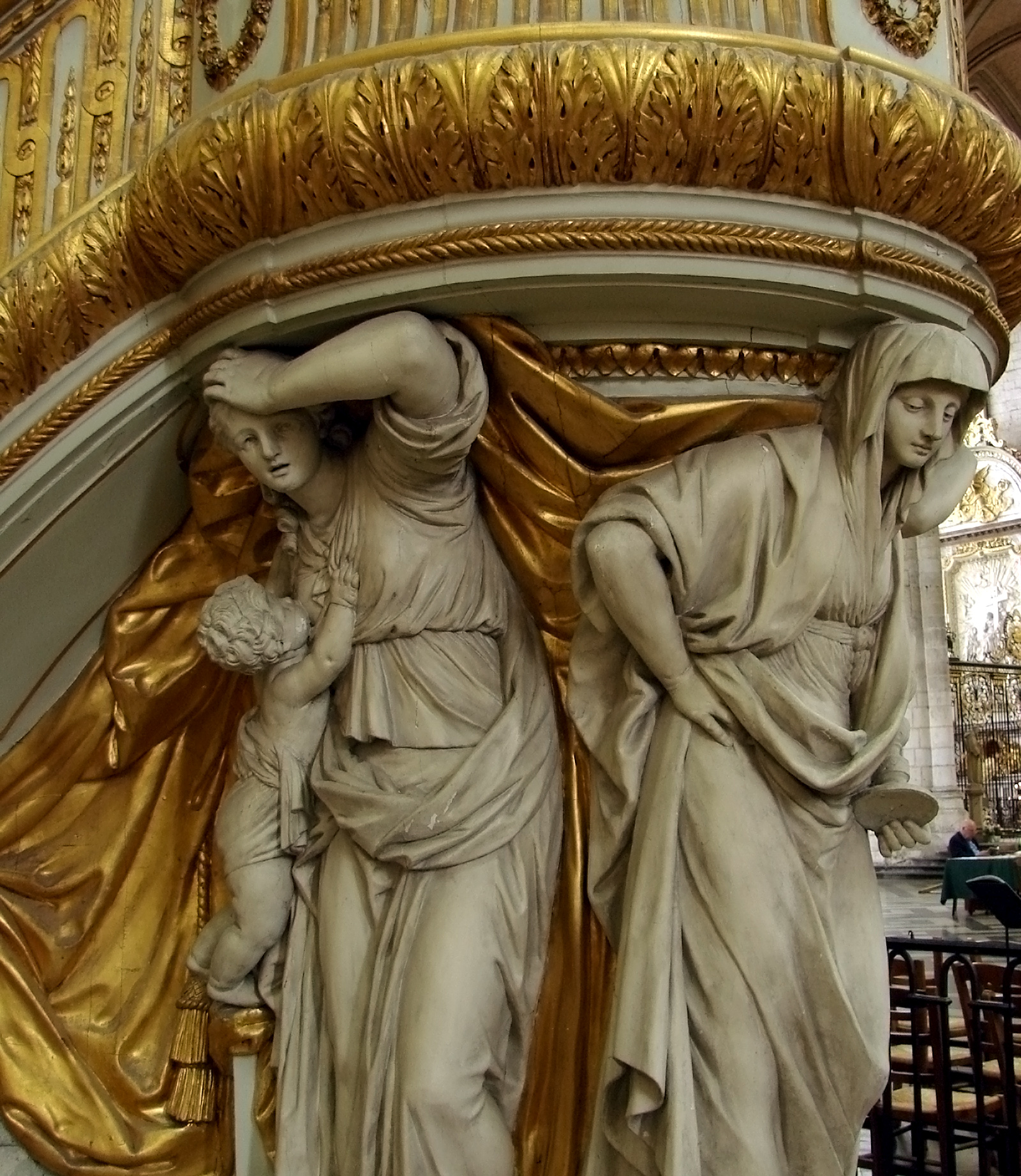 Chaire de la cathédrale d'Amiens: les statues allégoriques.